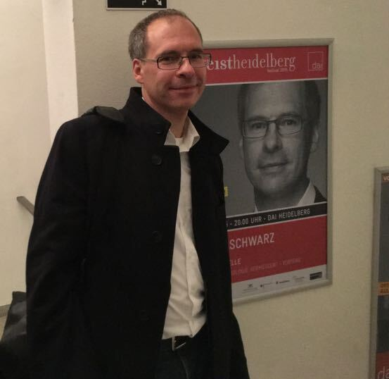 Ein Bild des Physiker Ulrich Schwarz der Universität Heidelberg.